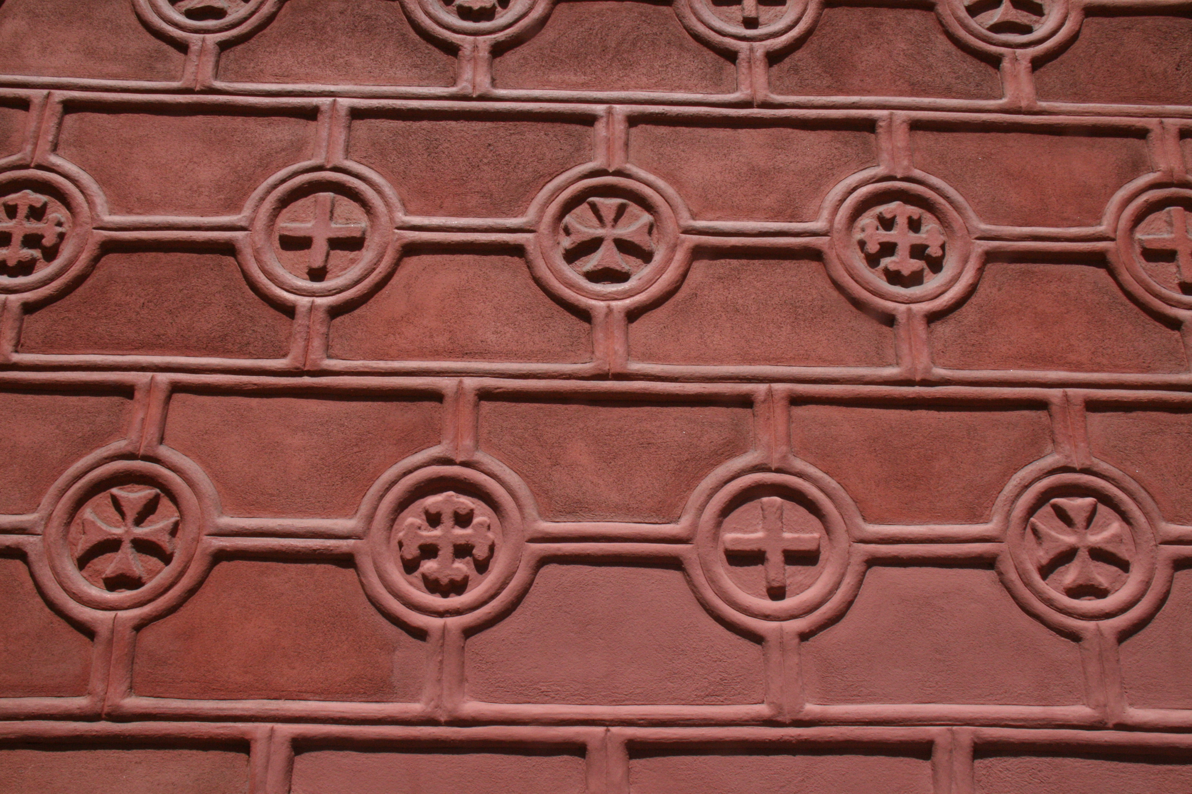 PAred de la Iglesia de la Concepción Real de Calatrava, Madrid